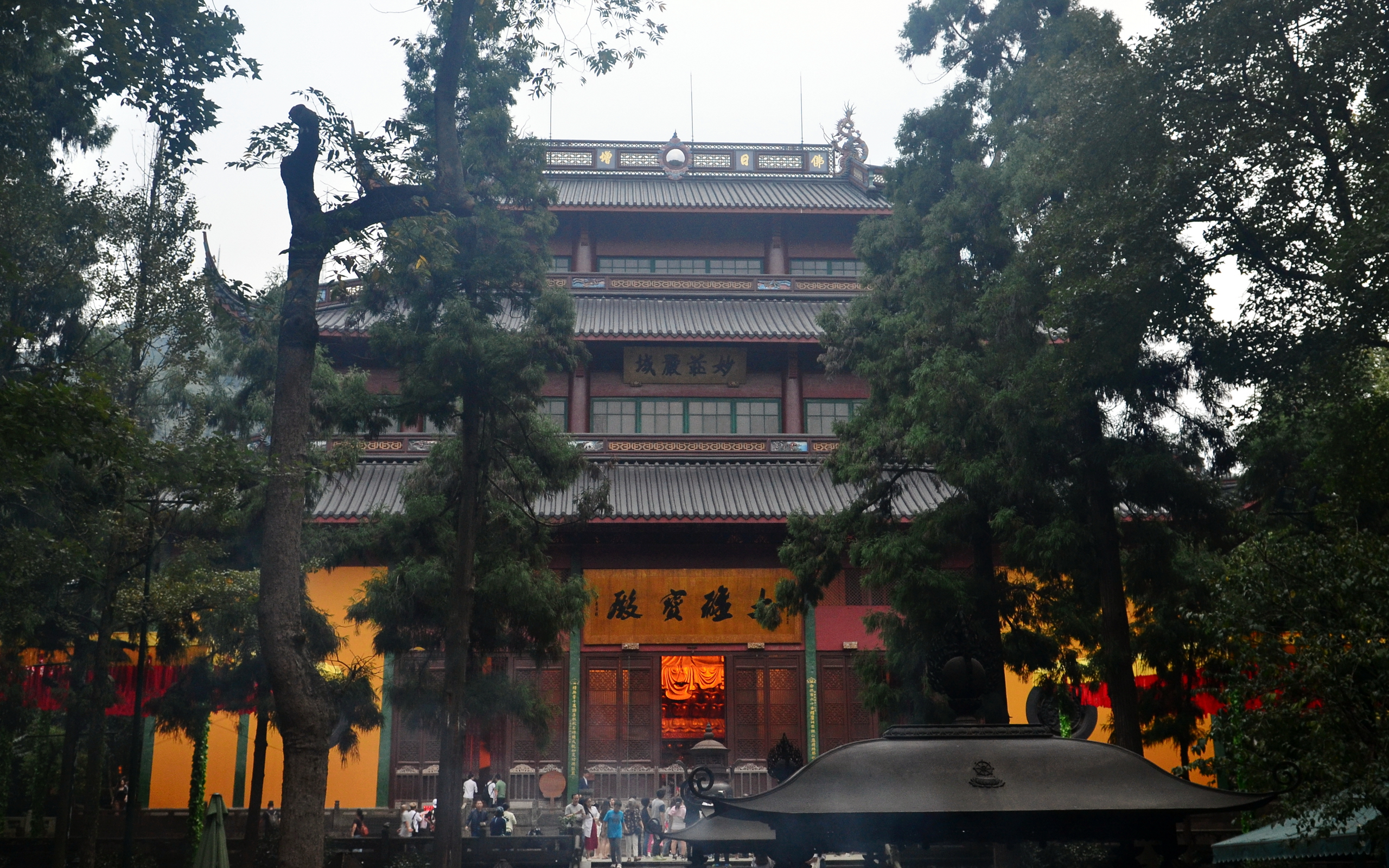 灵隐寺大雄宝殿